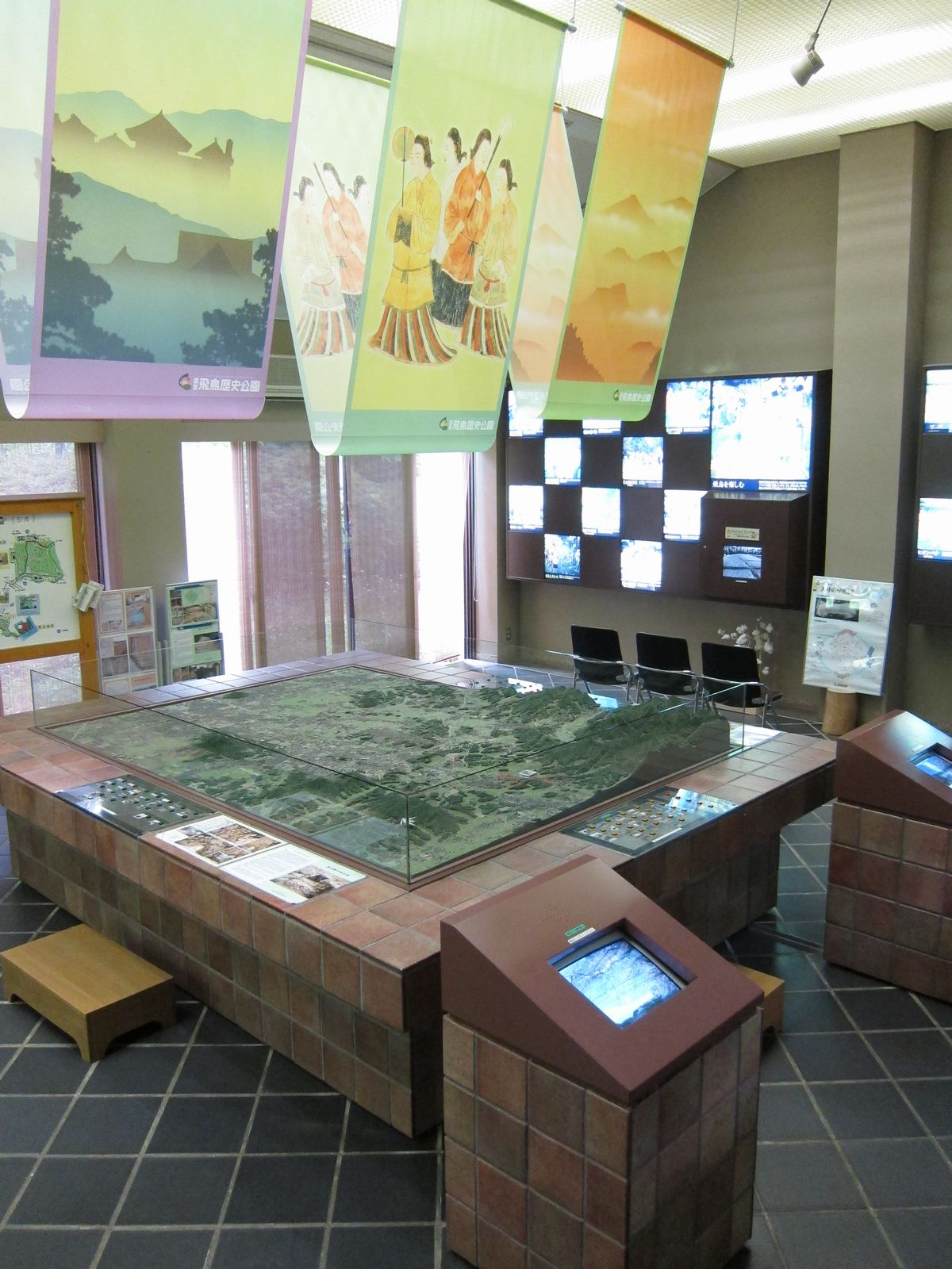 国営飛鳥歴史公園館